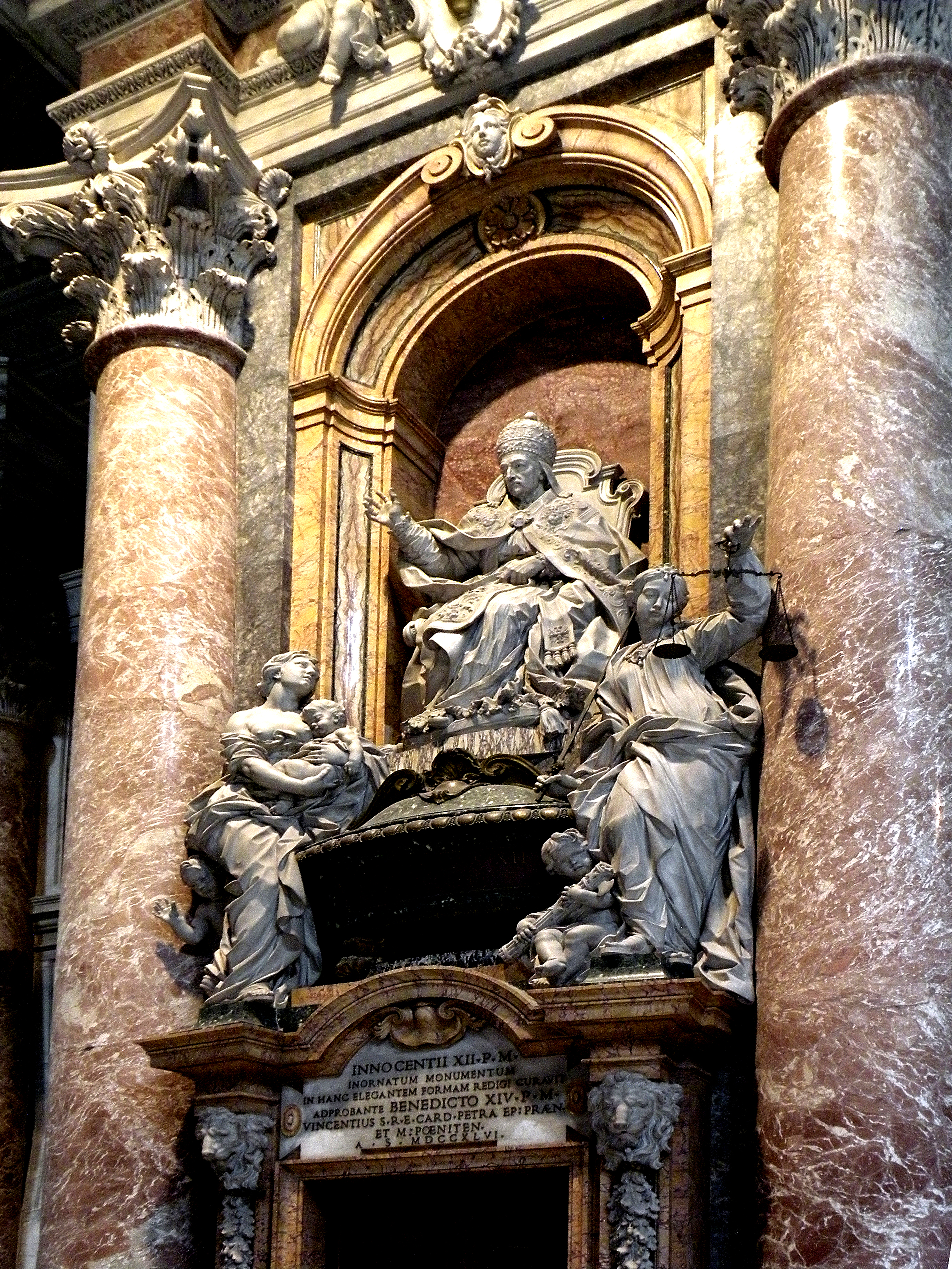 Надгробие папы Иннокентия XII